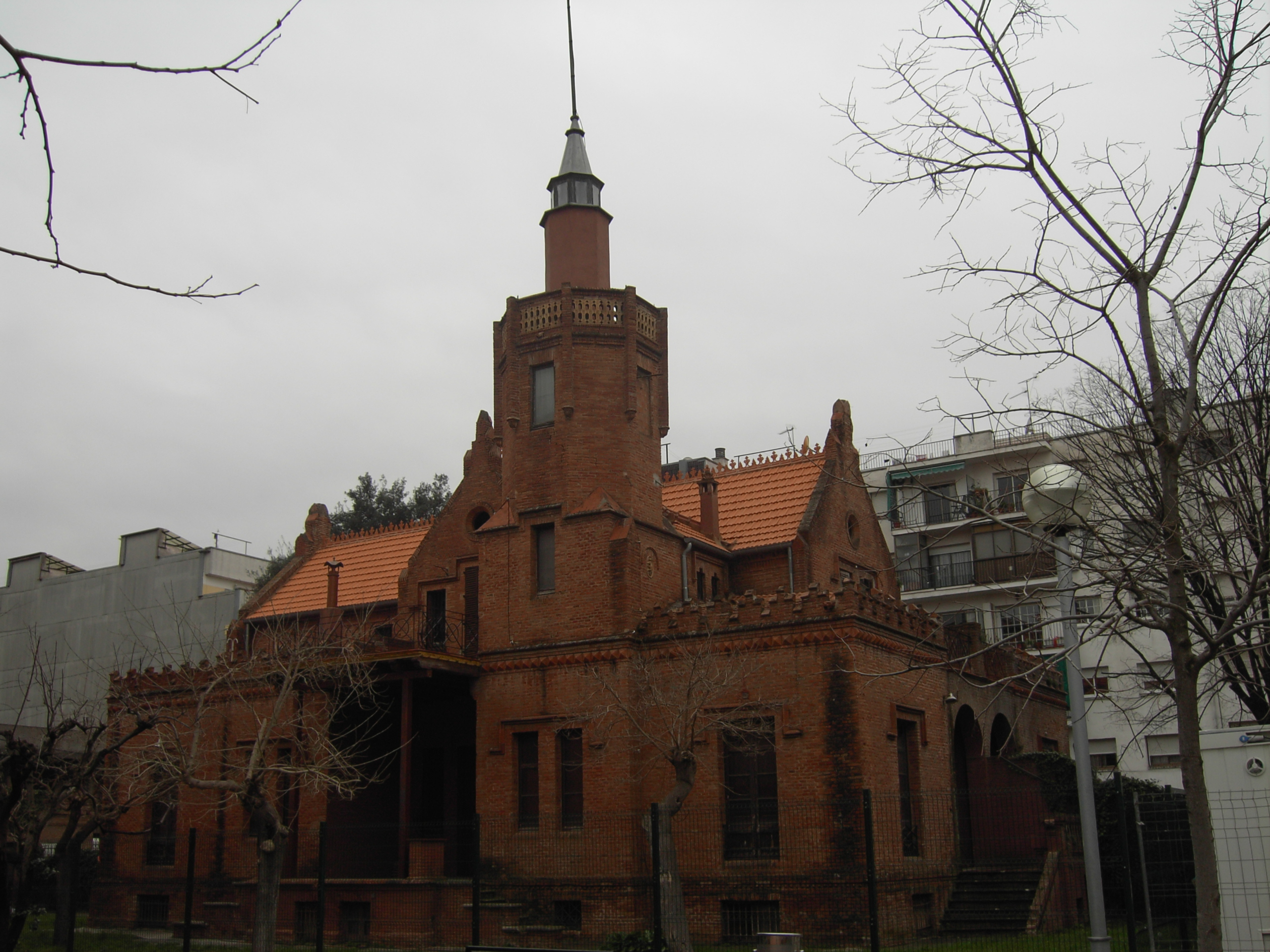 Torre Vermella (Red Tower) - Cerdanyola del Vallès, Catalonia